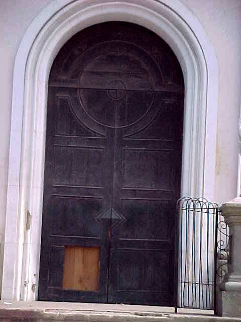 La Guaira en el estado Vargas - Venezuela a un año de del deslave de diciembre de 1999 (2000)